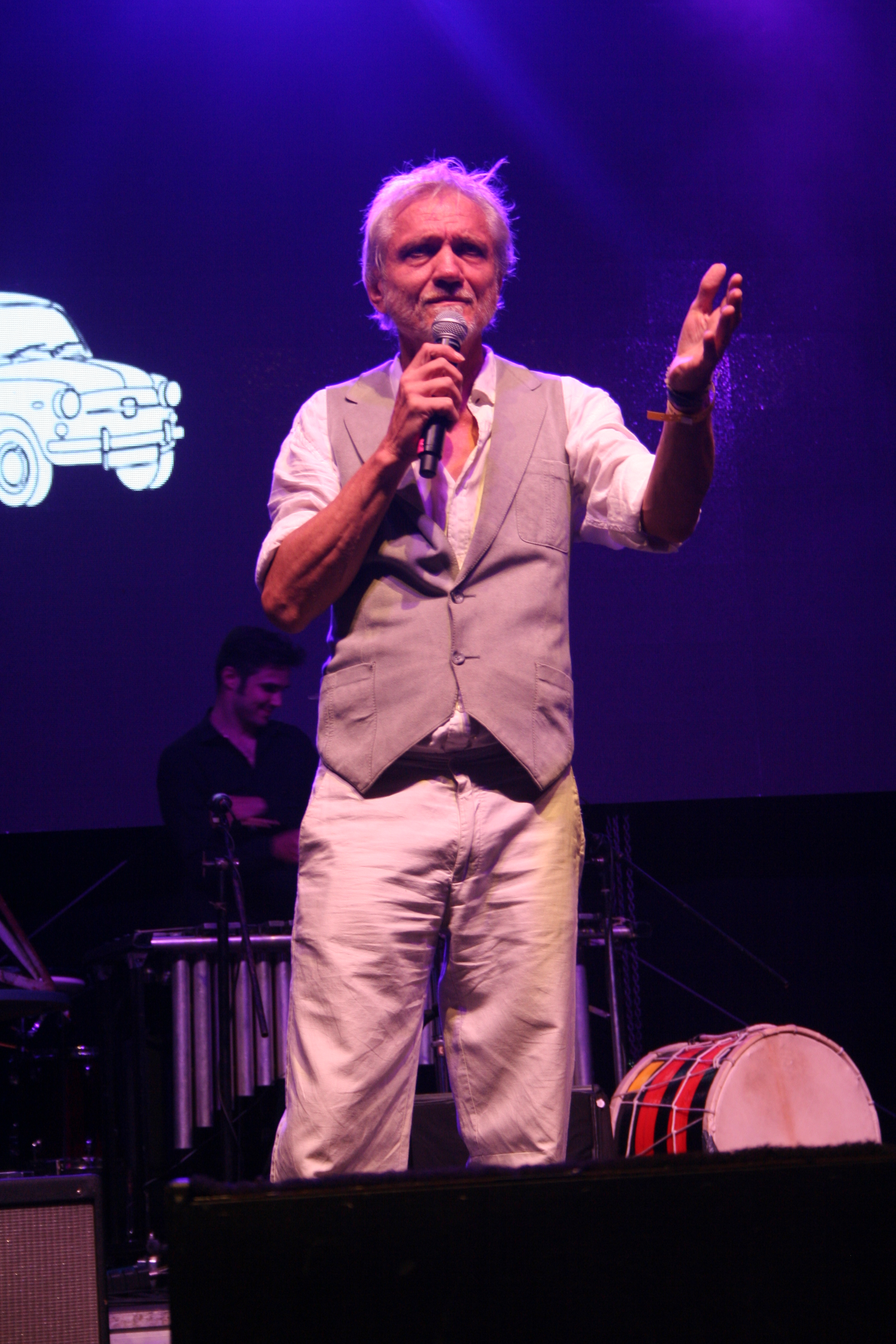 Darko Rundek, koncert na Šabačkom letnjem festivalu 2017.